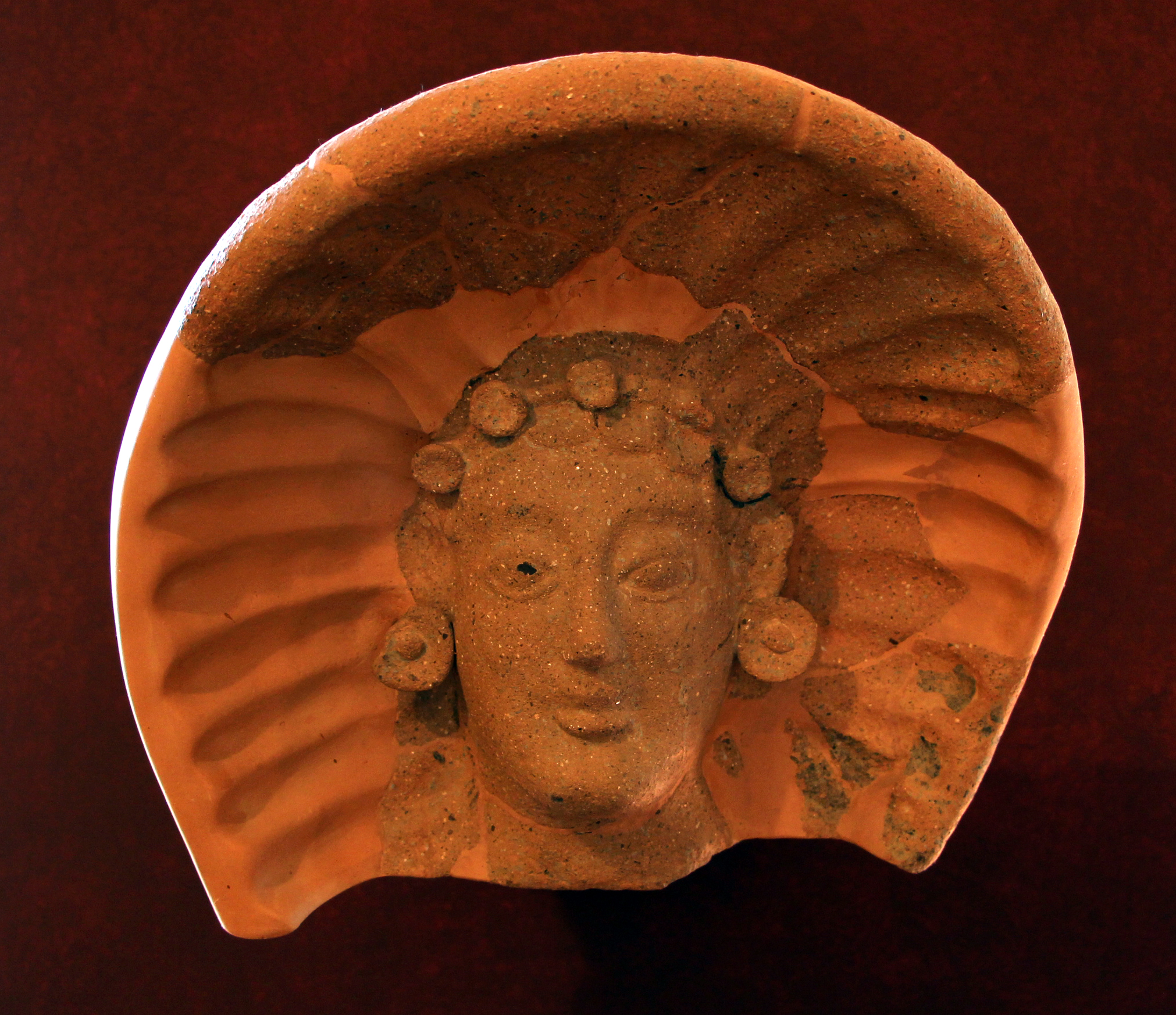 Villa Corsini a Castello - MIBAC This is a photo of a monument which is part of cultural heritage of Italy.